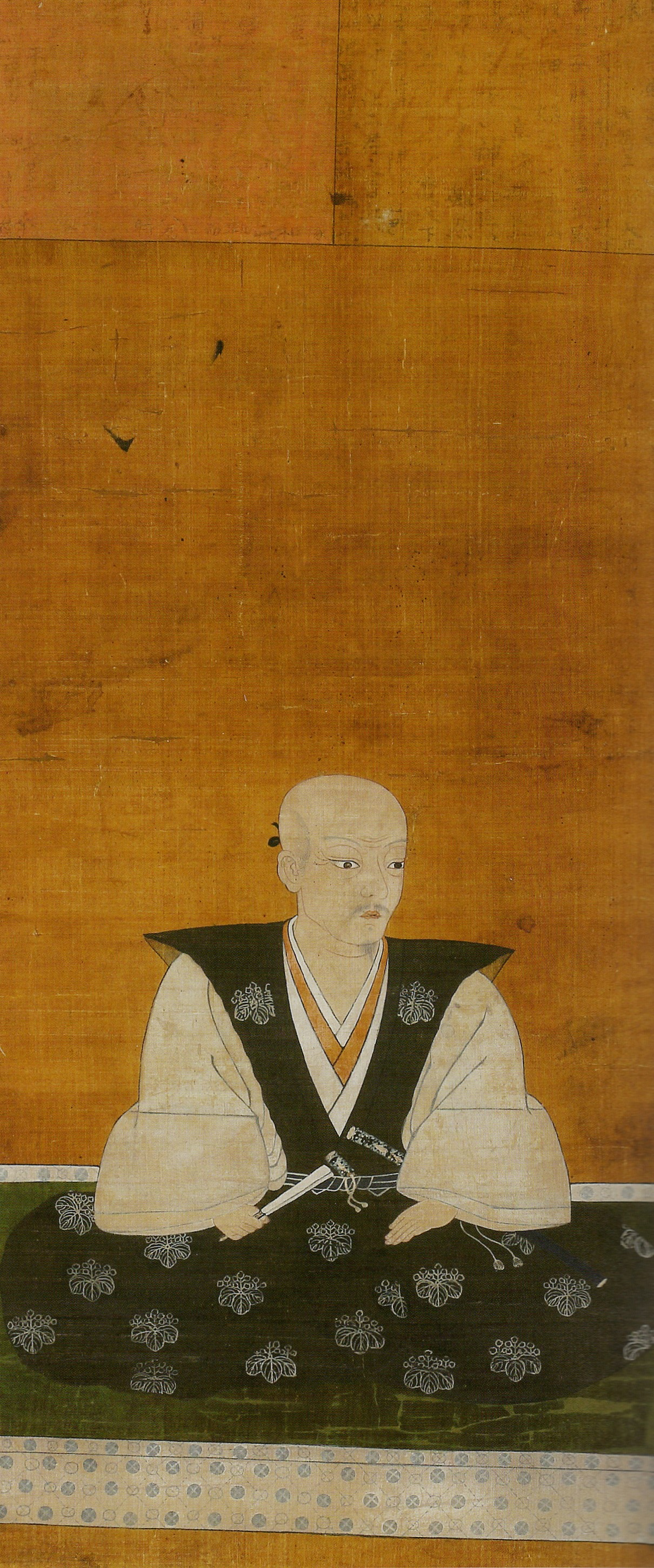 細川野州家7代当主・細川通薫の肖像画。